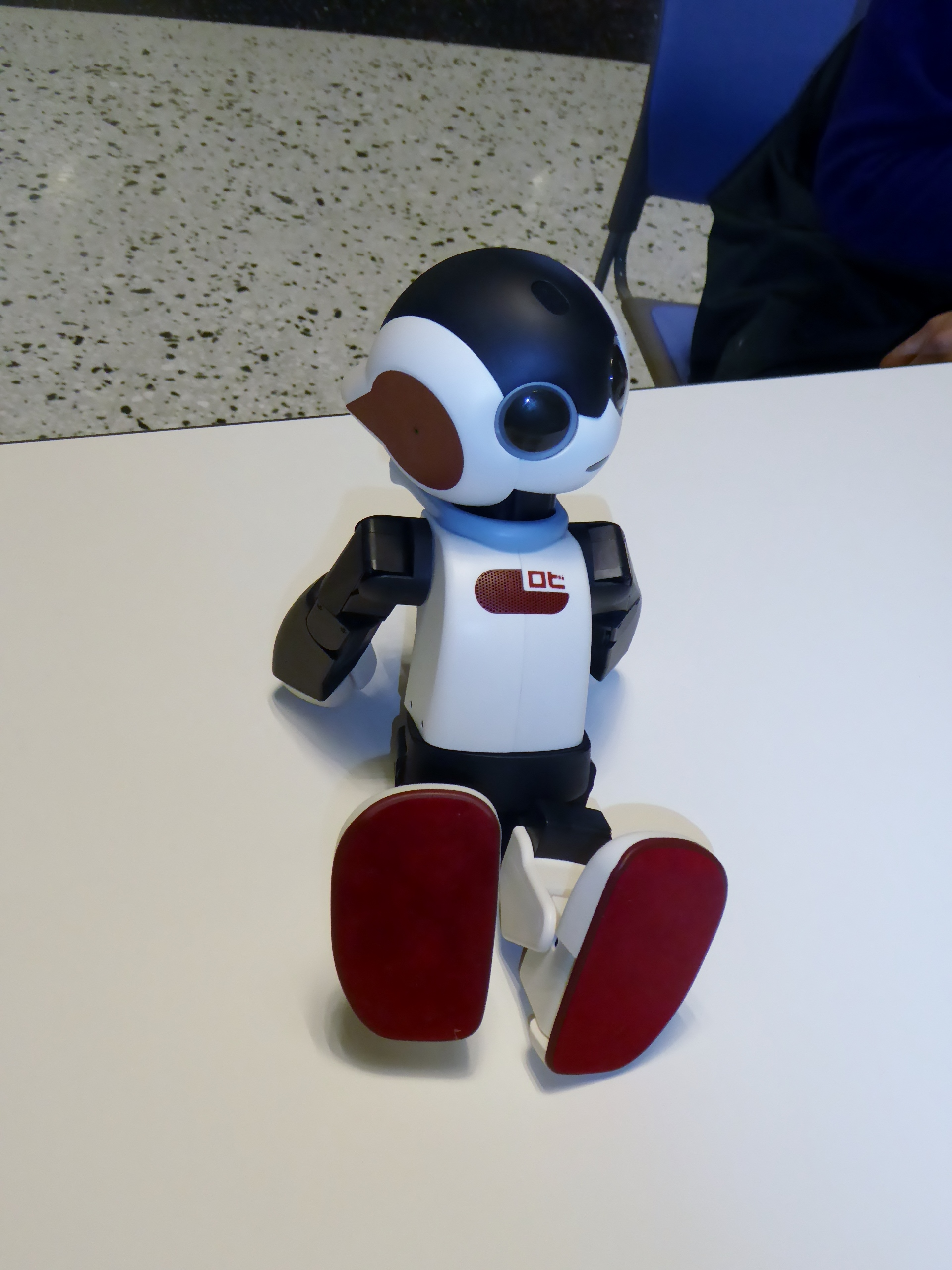 Robiを撮影。